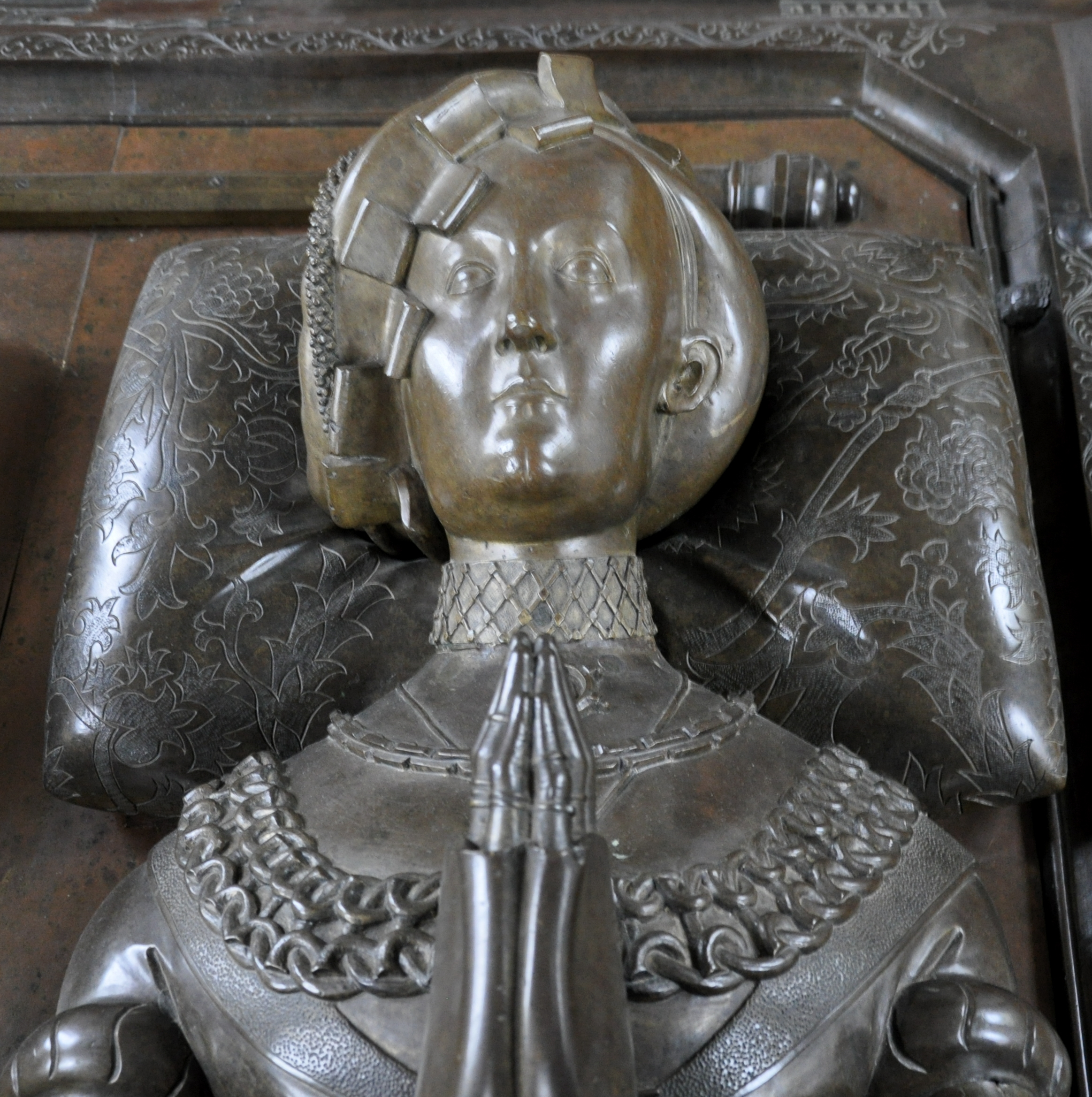 Bordesholm, Klosterkirche, Bronze-.Kenotaph des Herzogs Friedrich I. von Sohleswig-Holstein-Gottorf († 1533) und seiner Ehefrau Anna von Brandenburg († 1514) , Skulptur der Anna